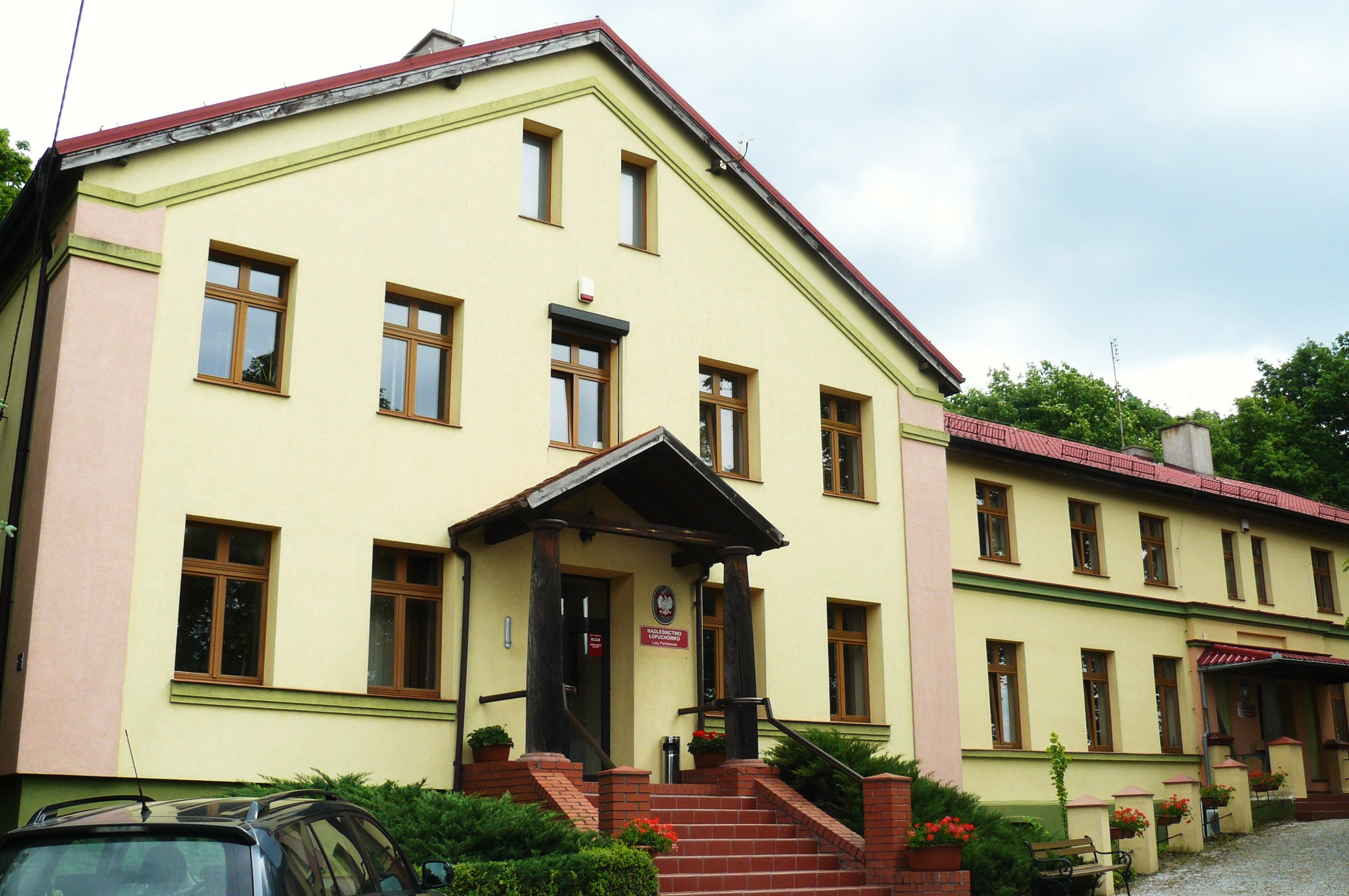 Nadleśnictwo Łopuchówko. Siedziba.